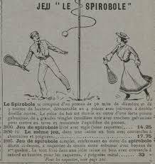 Un jeu avec deux raquettes et une balle attachée à un poteau. Son nom est identique à celui du lance-serpentin inventé en 1896.